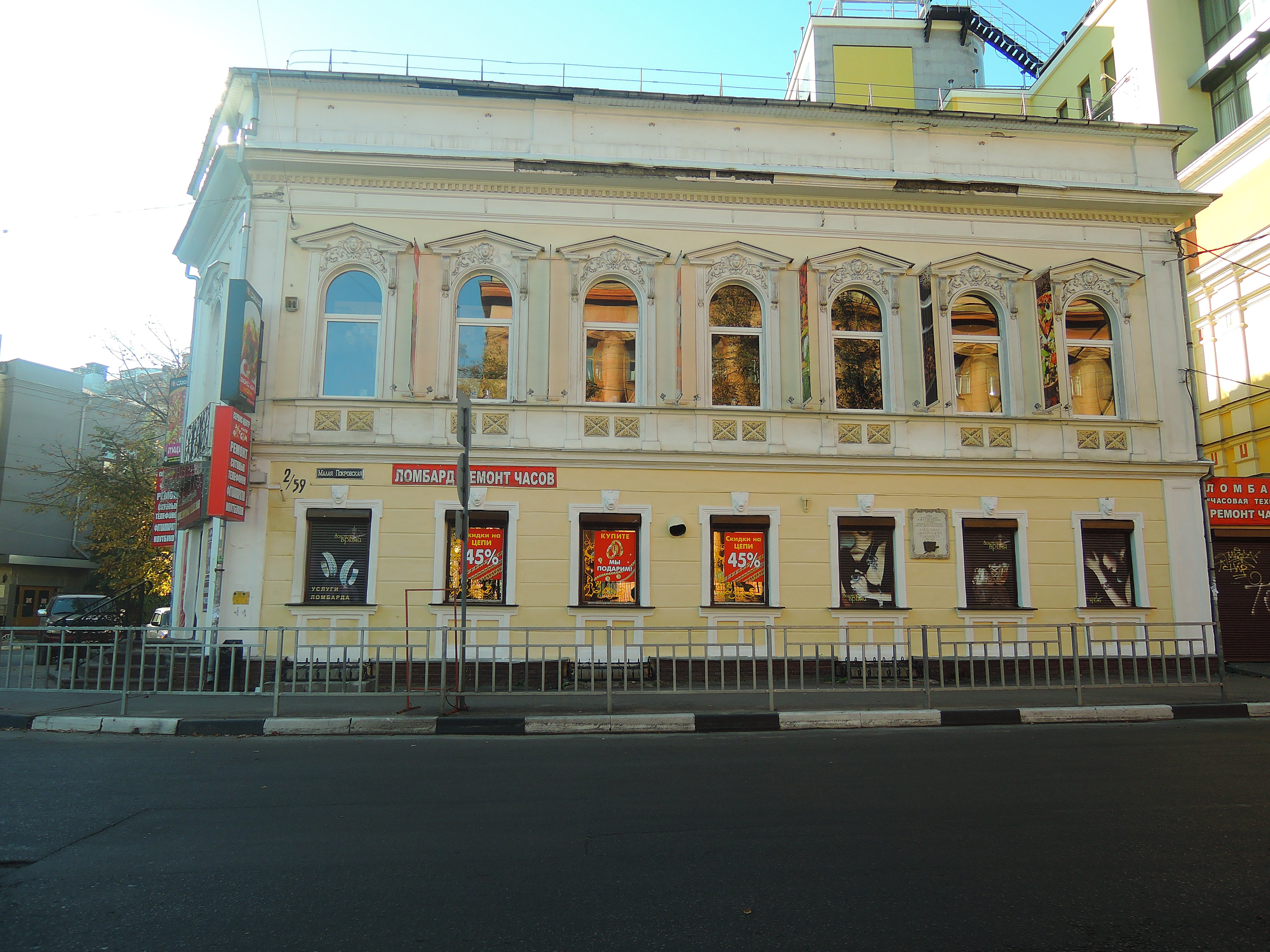 Дом, в котором в 1853-1858 гг. жил музыкальный критик А.Д. Улыбышев: улица Малая Покровская, 2/59, Нижний Новгород, Нижегородская область